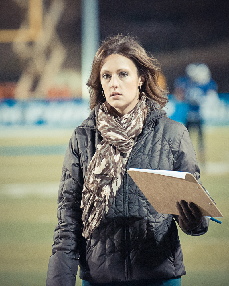 Stagg Bowl 2012